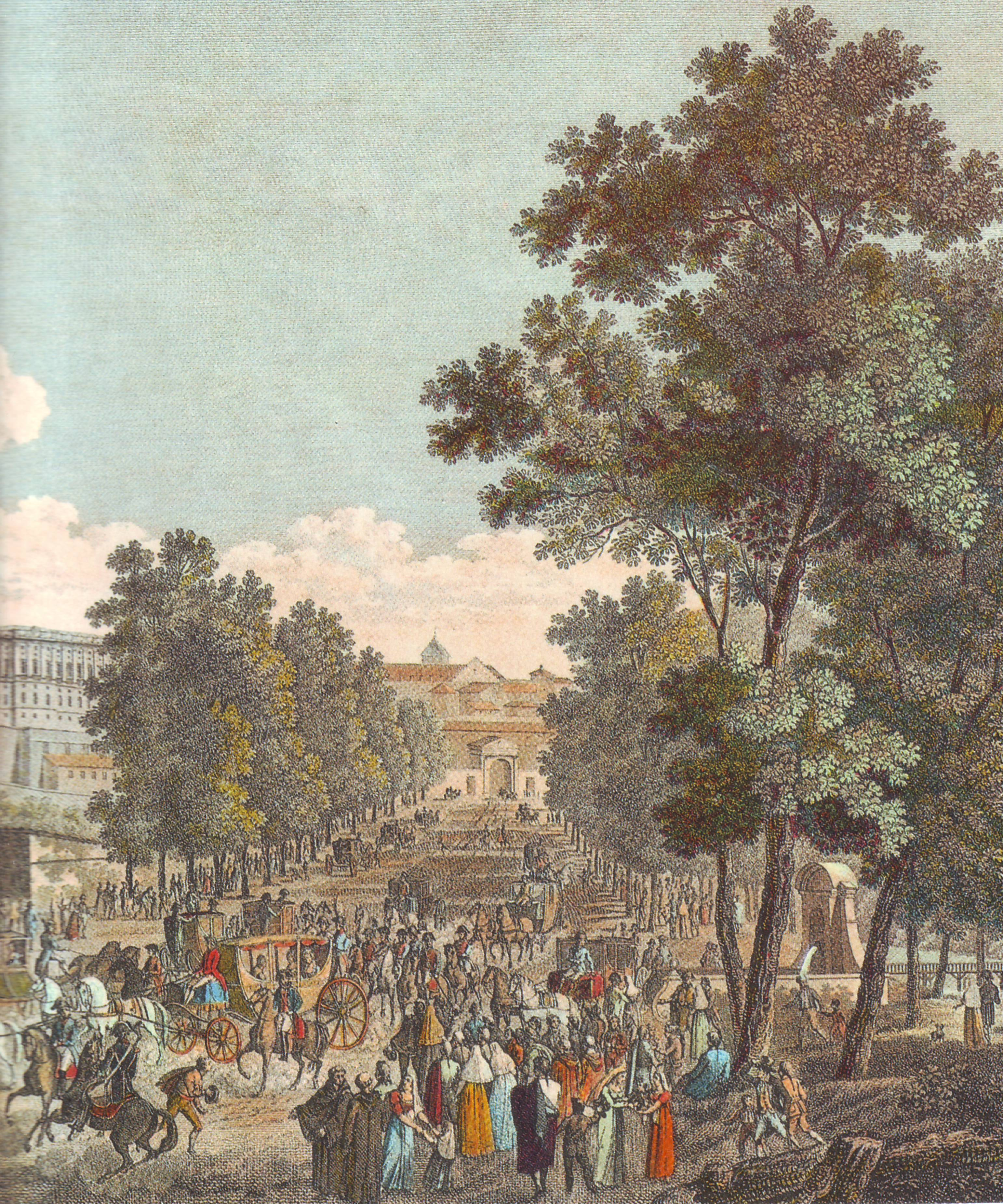 Detalle de la Vista del Paseo de la Florida en Madrid por el lado de Poniente, al inicio del siglo XIX, Madrid, España. Talla dulce en cobre (360x463 mm.) grabada por Jean Nicolas Lerouge, Gossard y Karl Schröder, dentro del Voyage pittoresque et historique de l'Espagne... (tomo II, parte segunda), del arqueólogo francés Alexandre de Laborde, durante su viaje de seis años por España, acompañando a Lucien Bonaparte, hermano del emperador. Editado por P. Didot, en París, entre 1806 y 1820